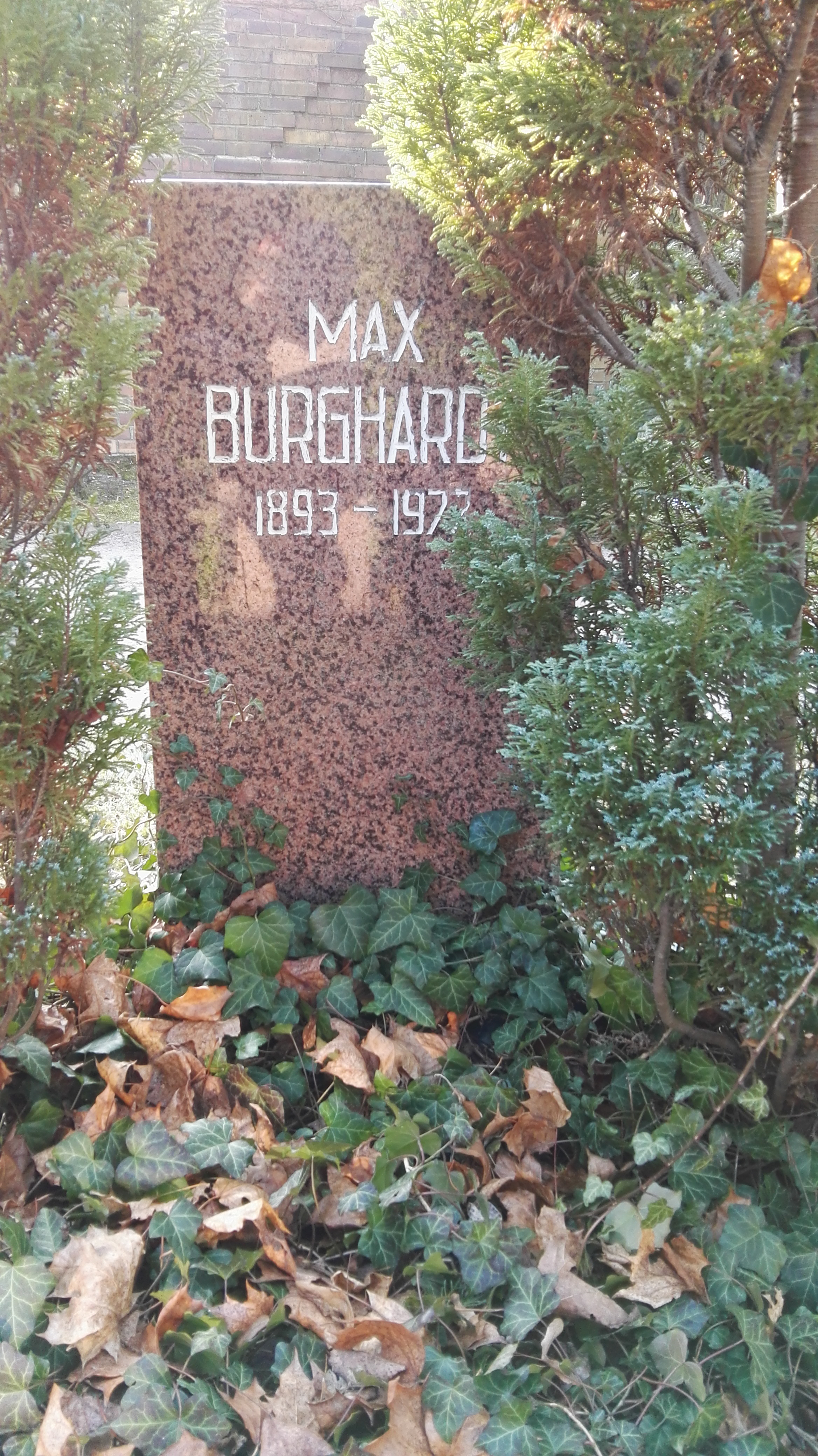 Grab von Max Burghardt in der Grabanlage Pergolenweg auf dem Sozialistenfriedhof des Zentralfriedhofs Friedrichsfelde